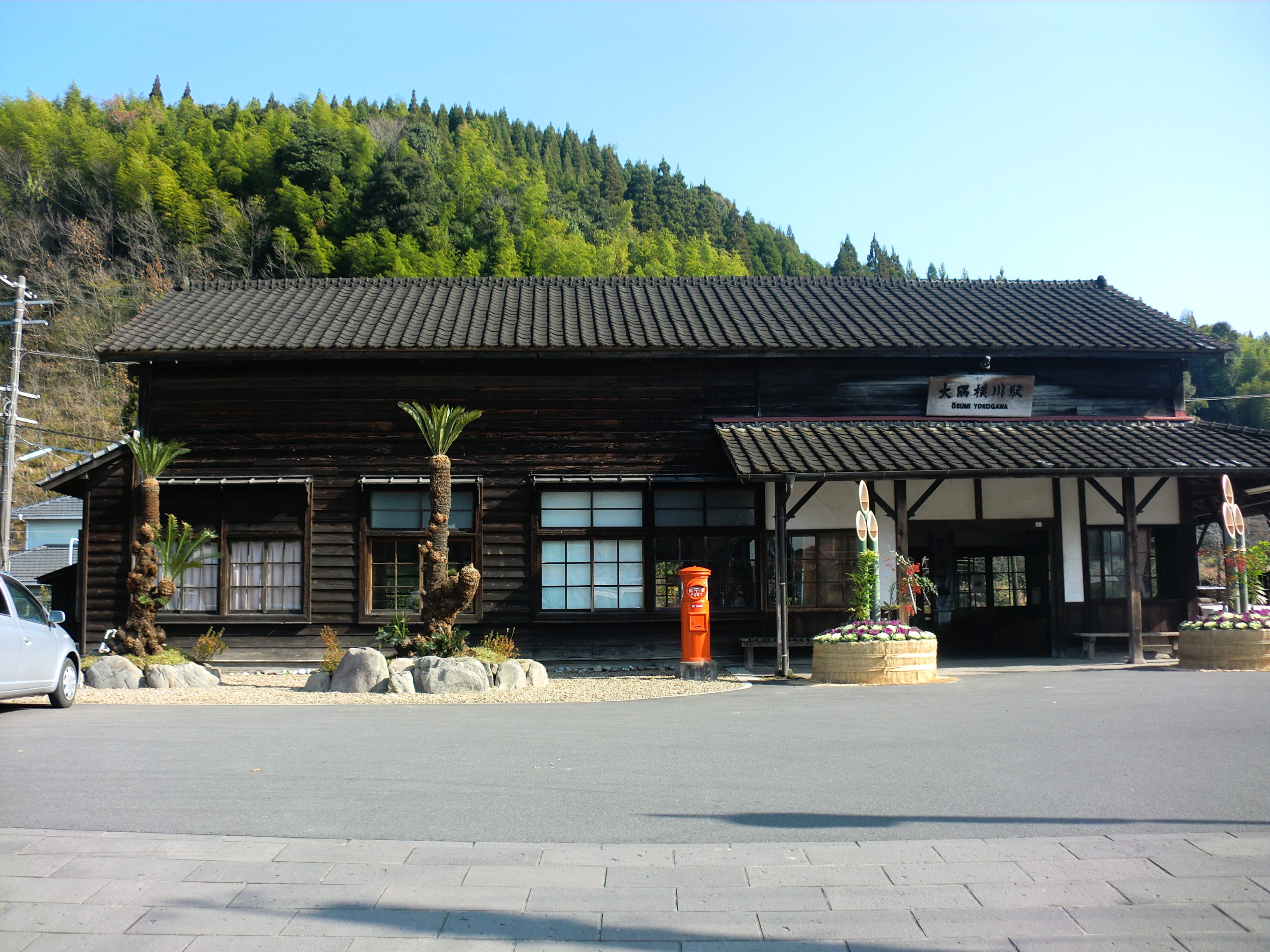 肥薩線大隅横川駅